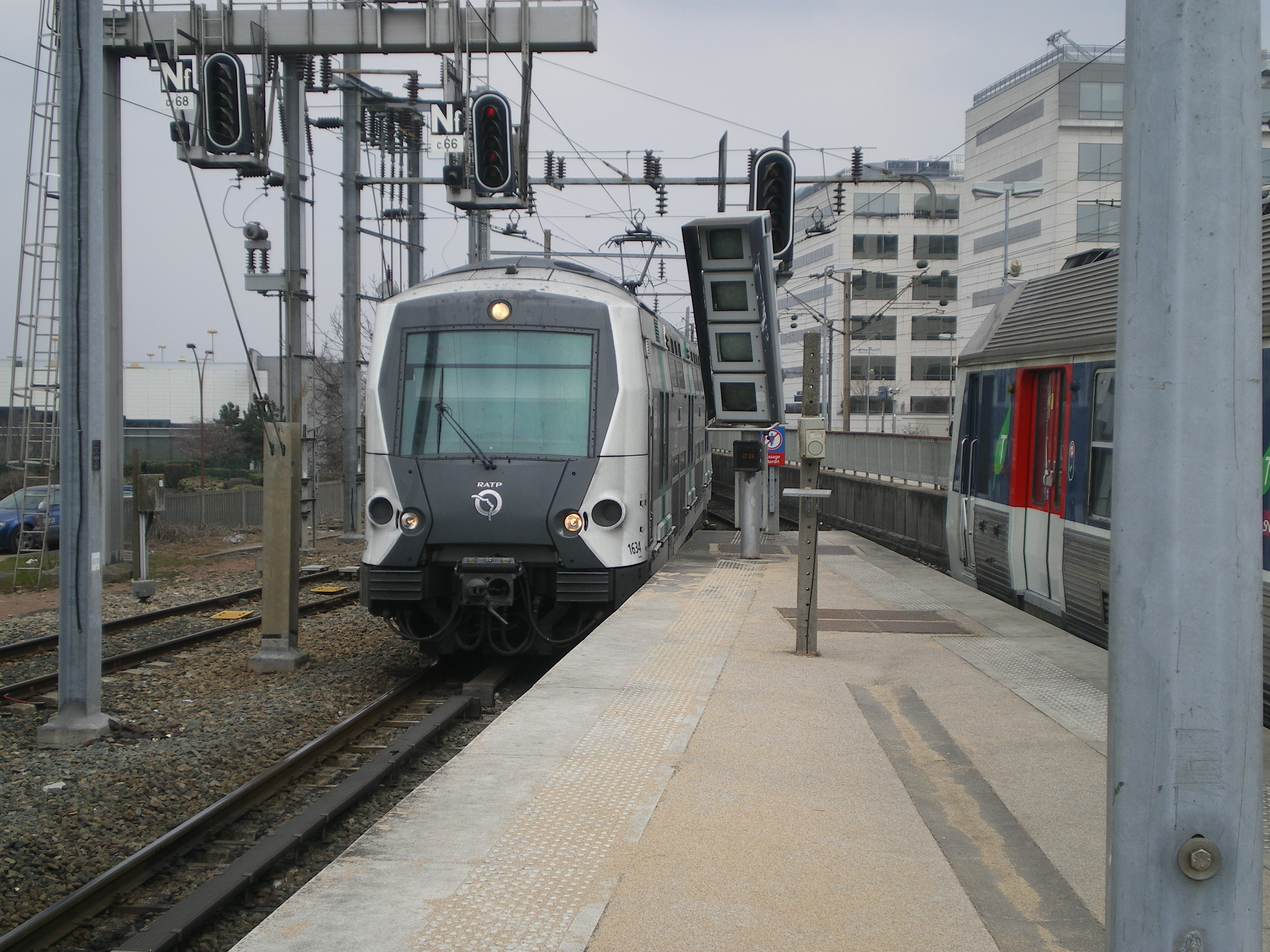 Deux rames automotrices (MI 09 et Z 6400) en gare de Poissy, département des Yvelines, France.